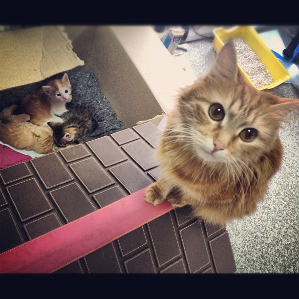 Талисман редакции "Коммерсантъ FM"